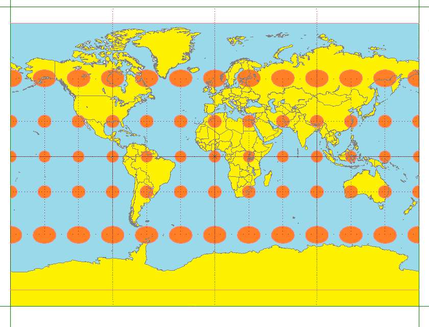 ミラー図法の場合のテイソーの指示楕円